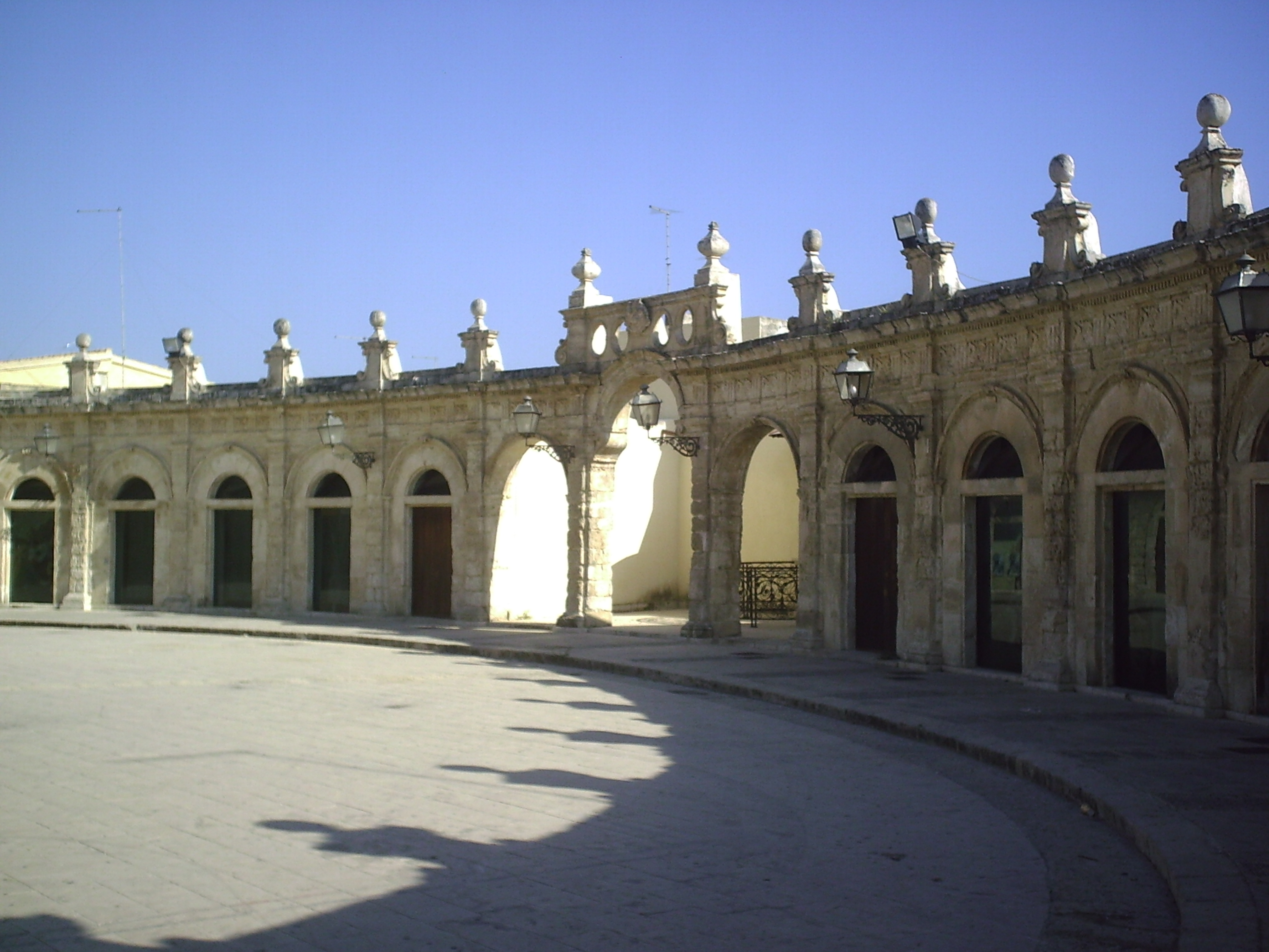 Loggiato del Sinatra in piazza Santa Maria Maggiore